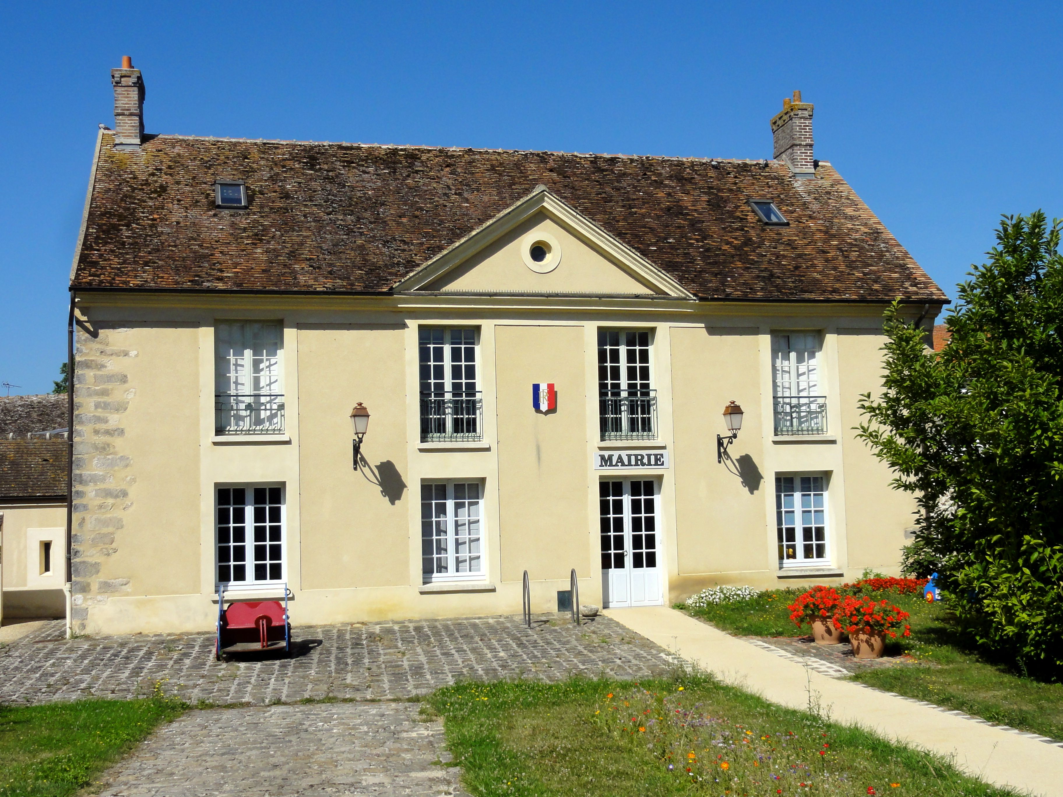 Mairie, rue du Cloître.